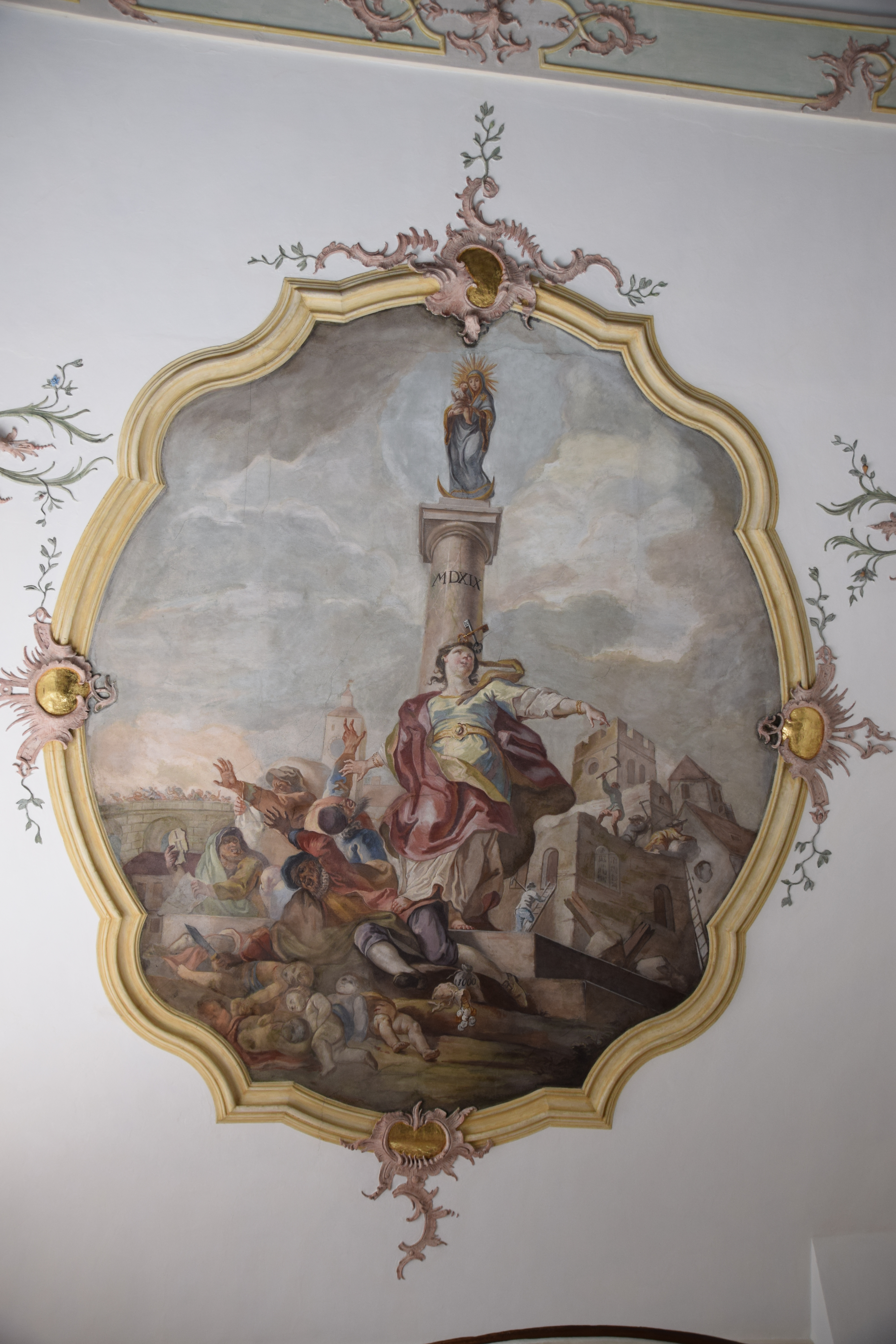 Fresko im südlichen Seitenschiff der Stiftspfarrkirche St. Kassian in Regensburg